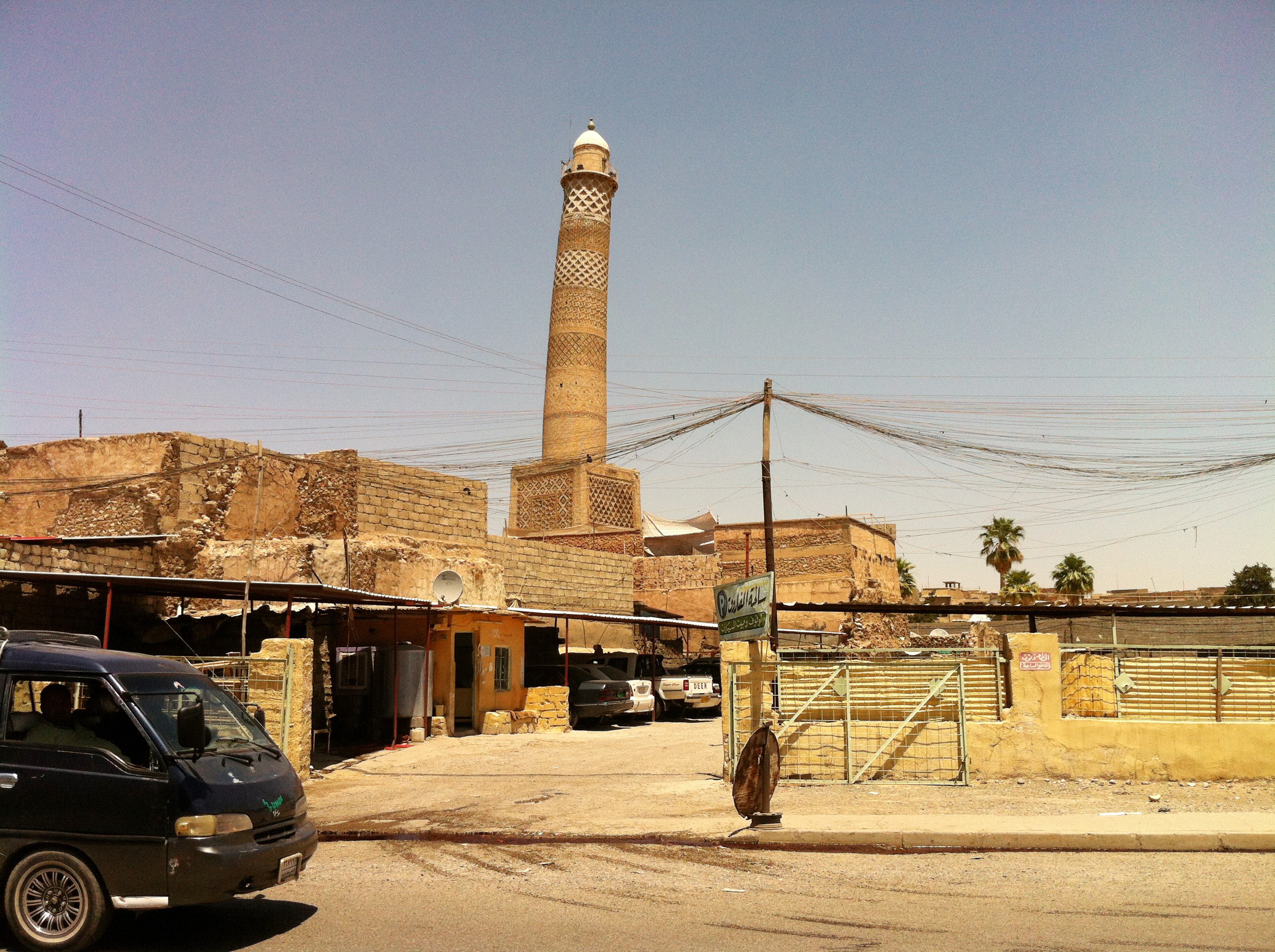 Al-Nuri Mosque (Mosul)